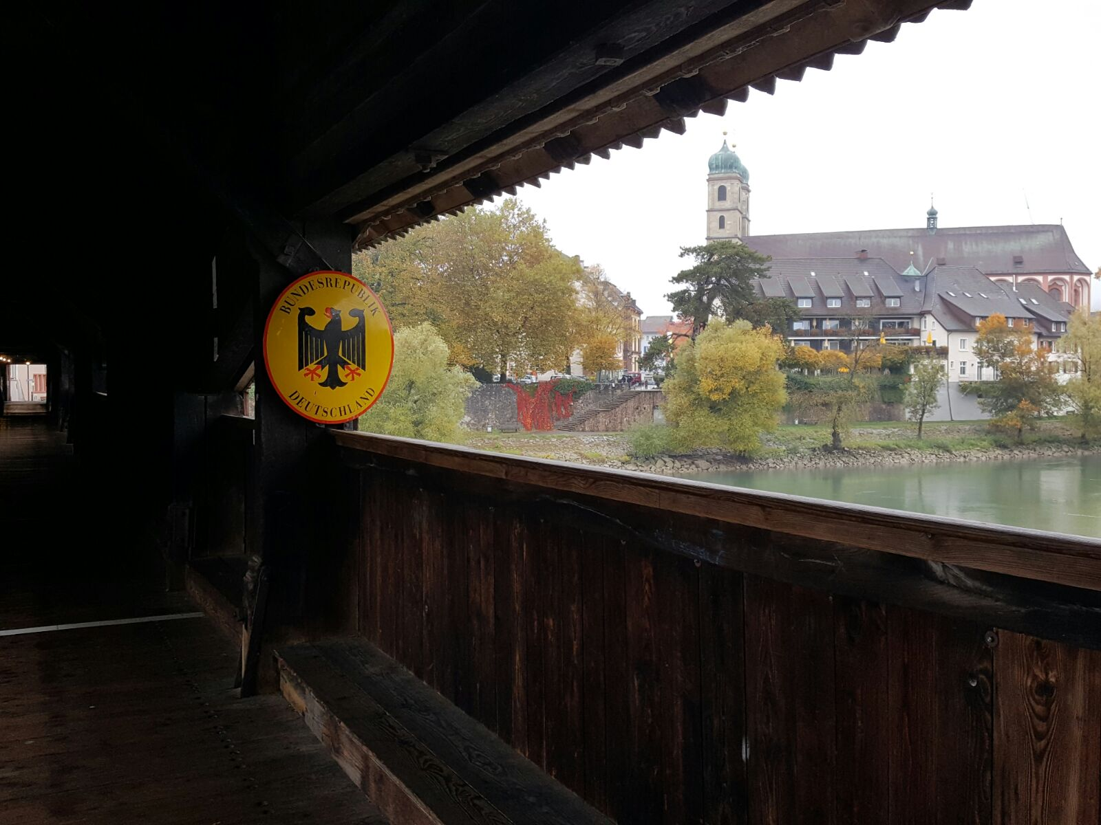 Holzbrücke Bad Säckingen